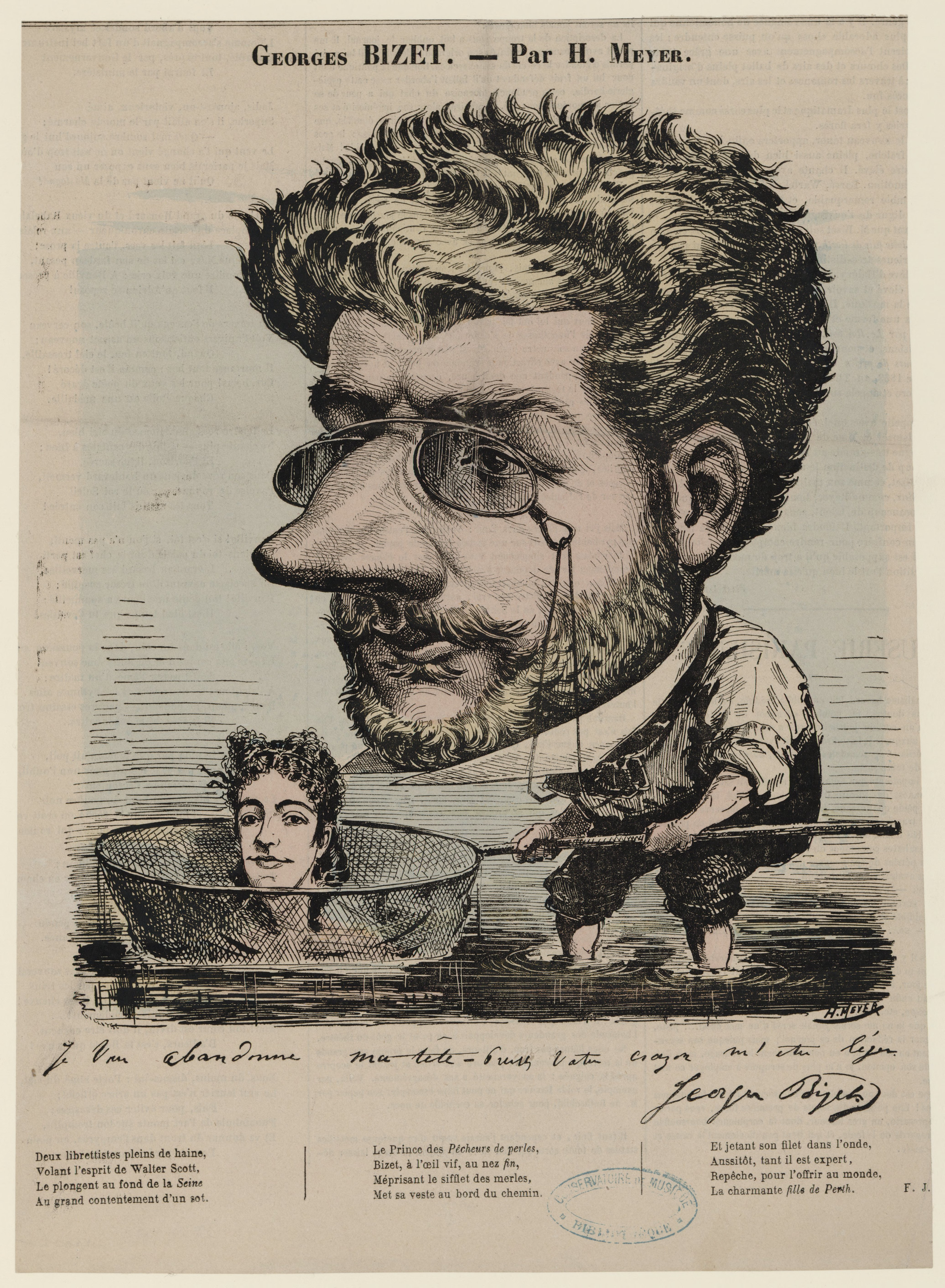 Caricature de Georges Bizet, publiée dans Diogène (hebdomadaire publié en 1867-1868), 28 septembre 1867